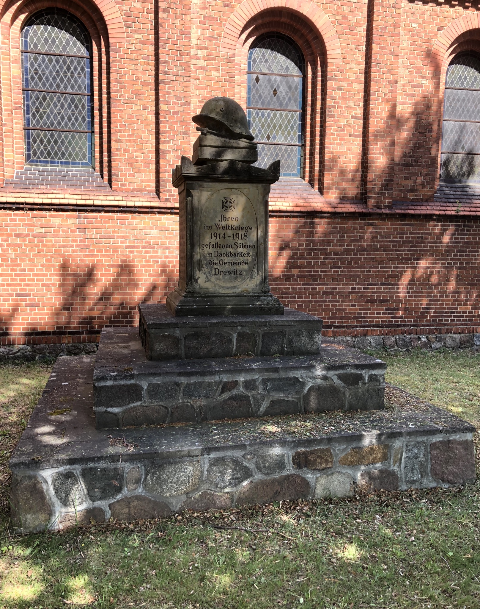 Kriegerdenkmal Drewitz